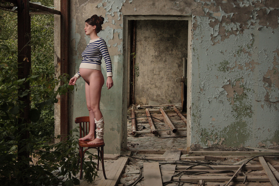 100x150 anton_solomoukha. Соломуха. Chernobil. La piese bleu. Mona Lisa di Antonio Maria (Antonmaria) Gherardini del Giocondo.jpg